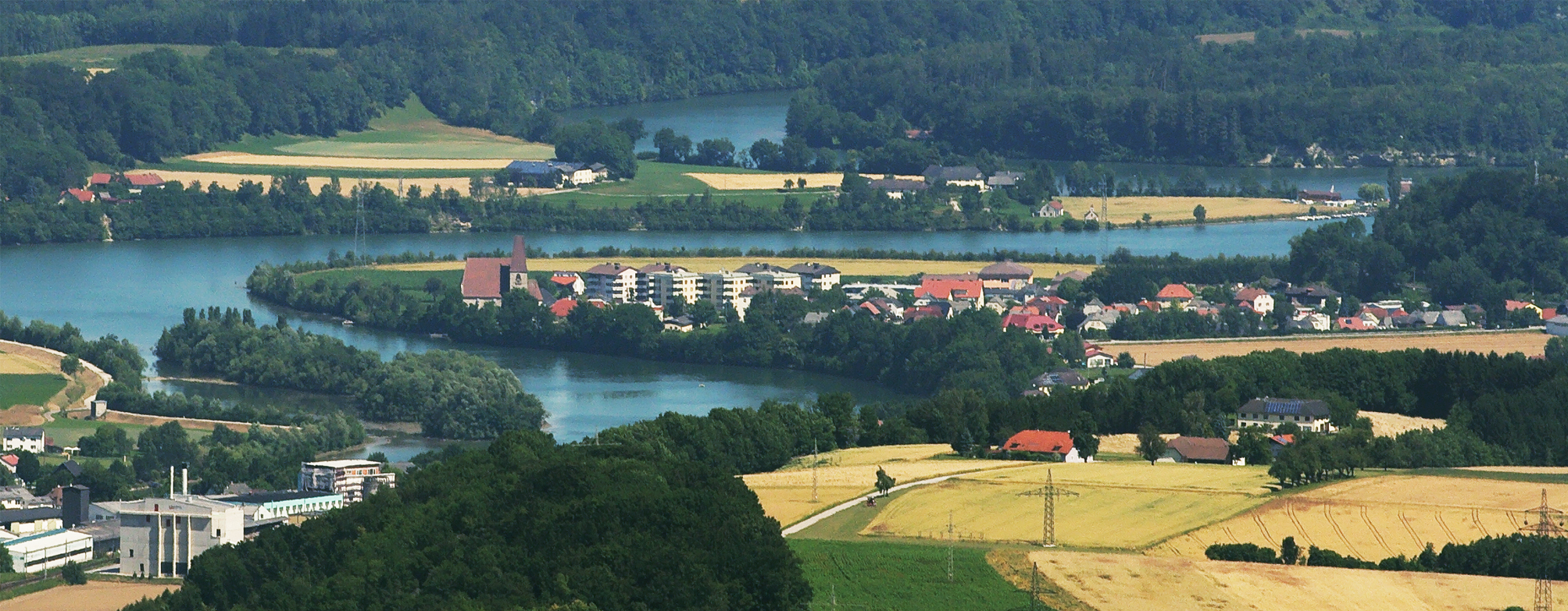 Blick von der Dambergwarte auf Haidershofen. Die Grenze zwischen Oberösterreich (links) und Niederösterreich (rechts) verläuft im Ennsfluss.